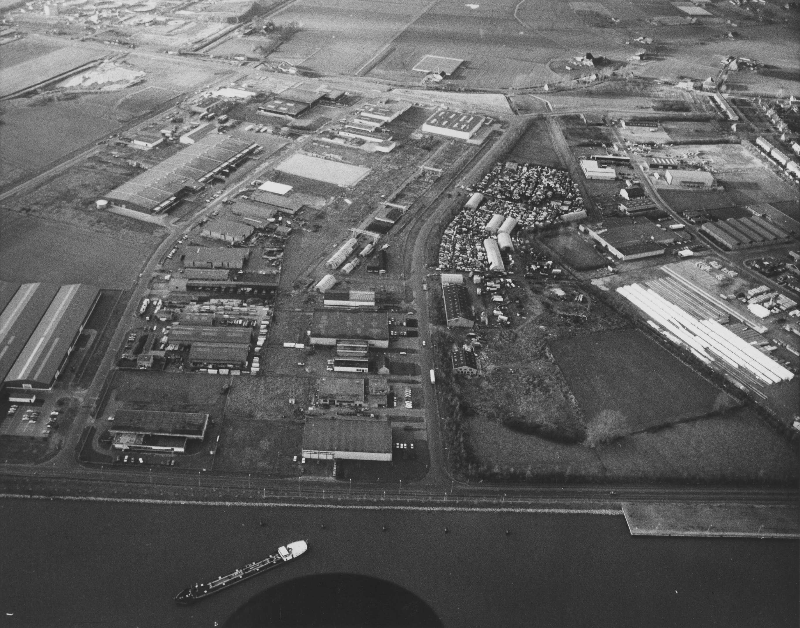 Luchtfoto Opname van het haven-en industrieterrein ca.1985